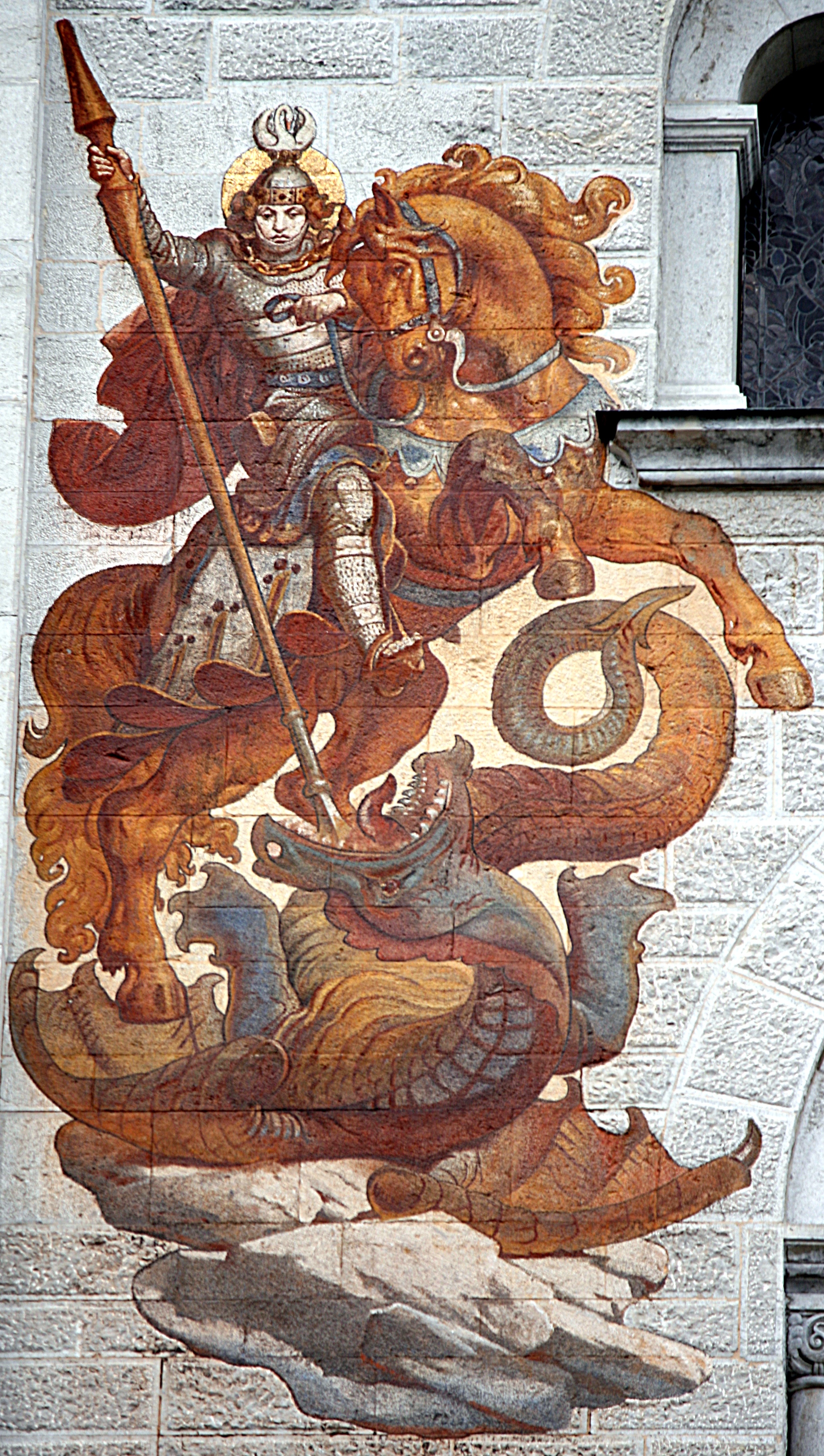 Schloss_Neuschwanstein